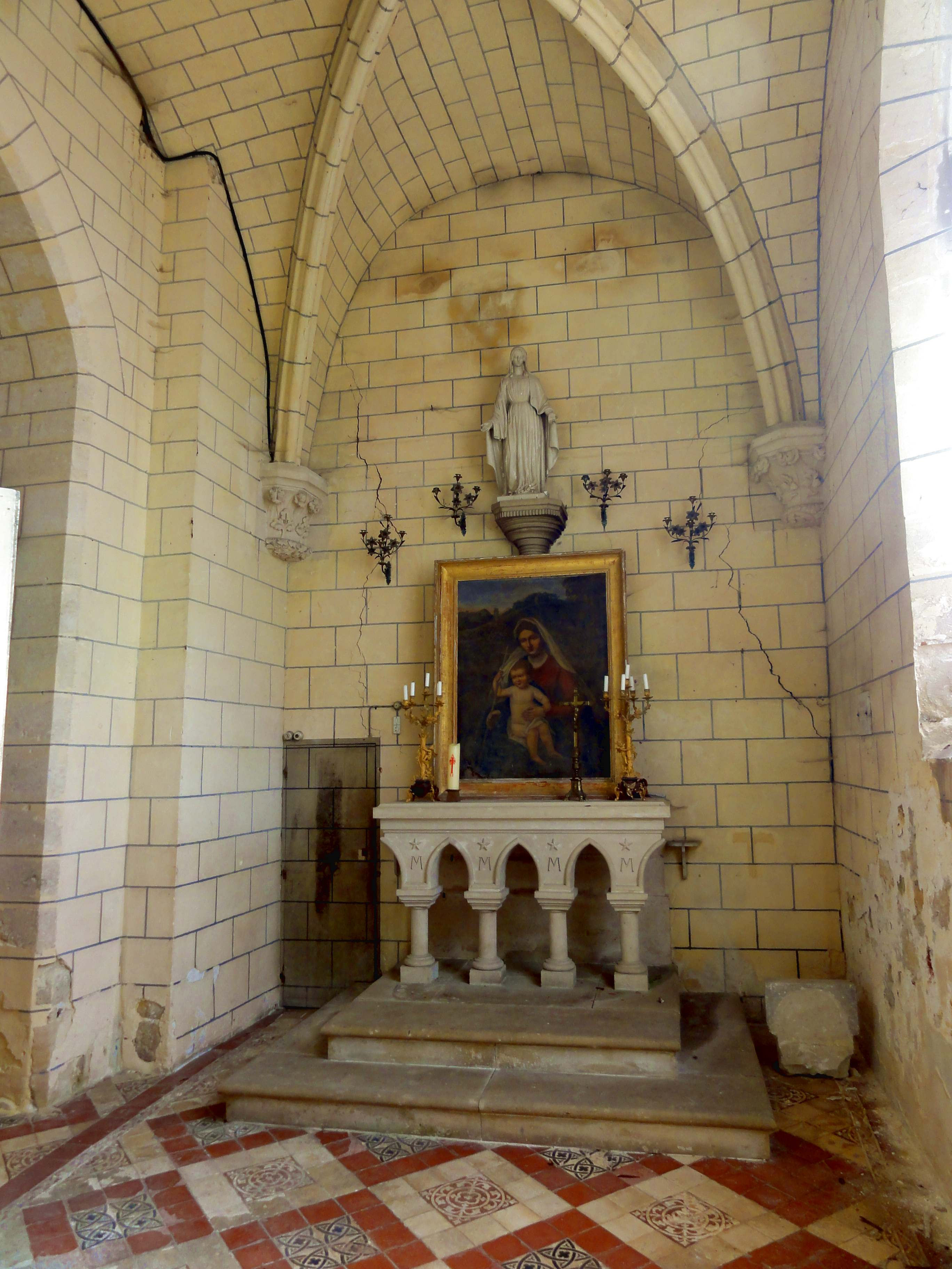 Intérieur de l'église - voir titre.